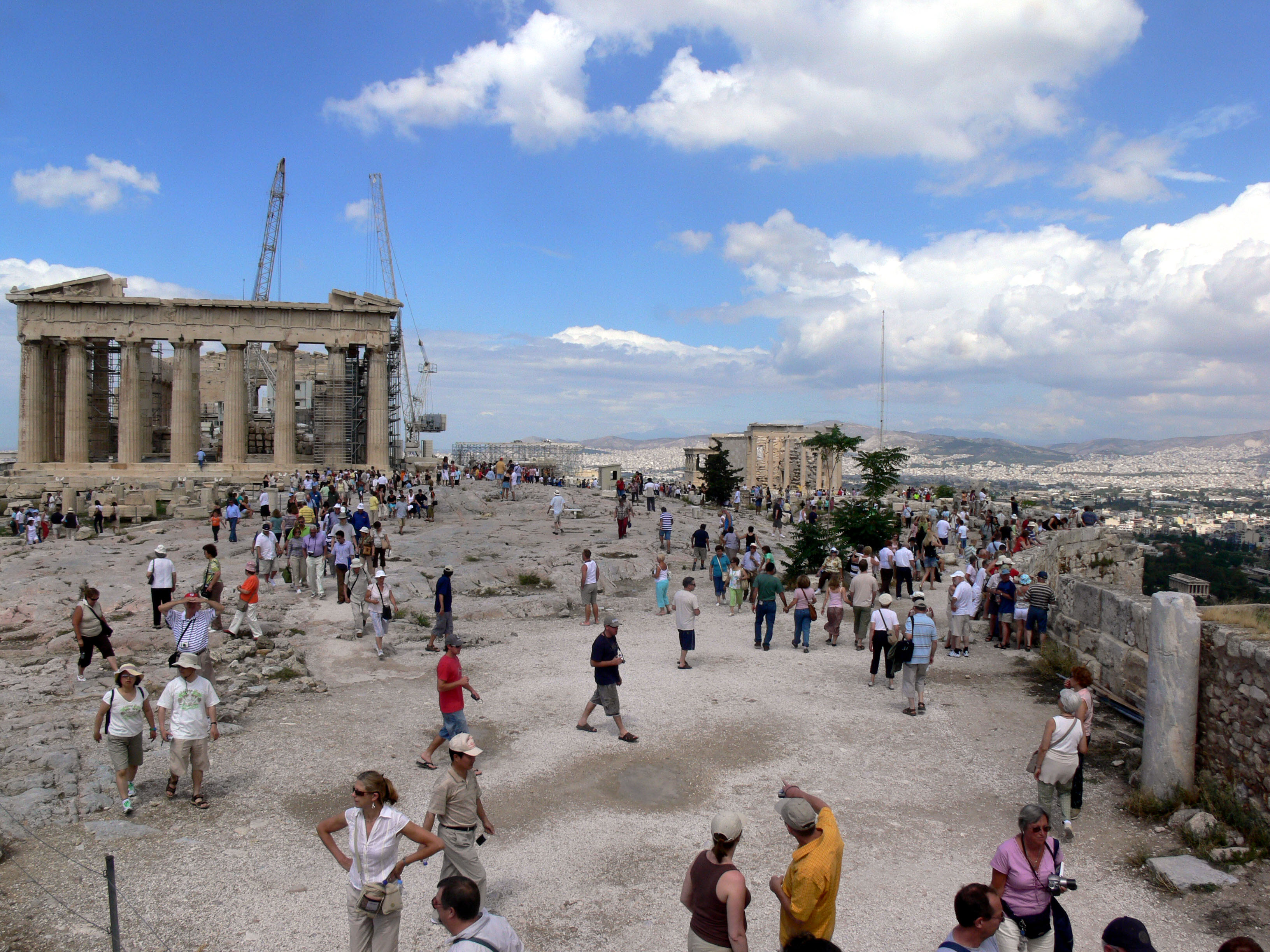 Akropolis